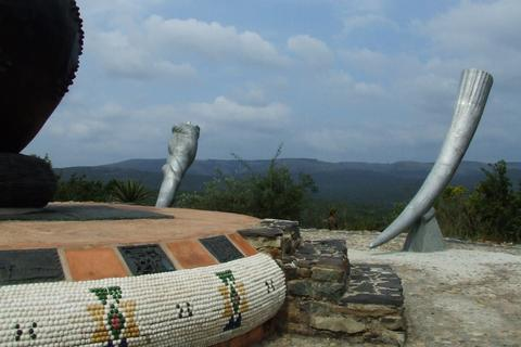 Emakhosini monument near Ulundi - Memorial to Zulu kings